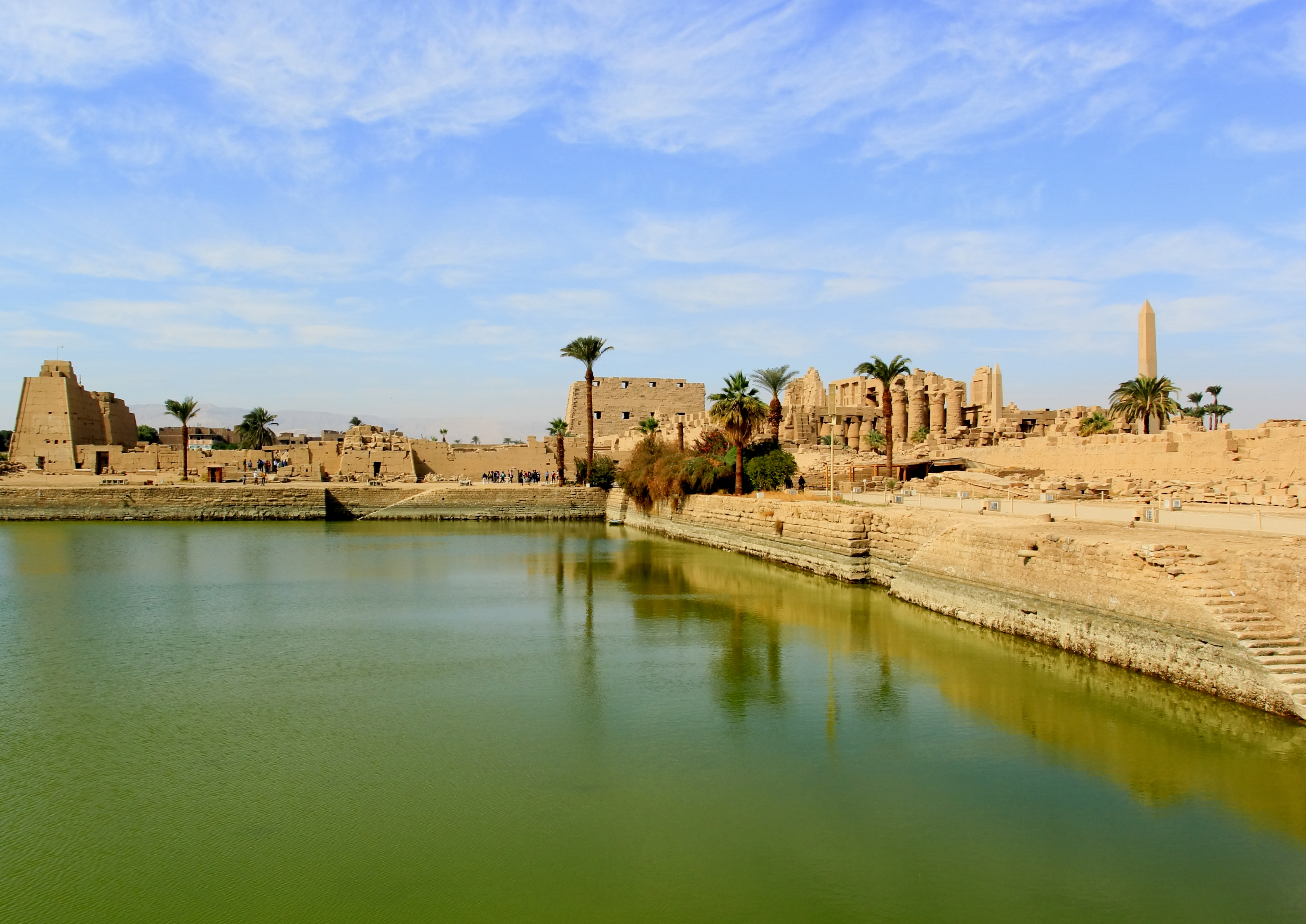 البحيرة المقدسة معبد الكرنك وسر المياه الثابتة التي لا تجف أنشأها الملك تحتمس الثالث ،بطول 80 مترًا، وعرض 40 مترًا، وكان يحيط بها سور. ويوجد على جانبيها الشمالي والجنوبي مقياس للنيل، له مدخلان أحدهما من الجهة الشرقية، والثاني من الناحية الغربية بكلا منها سلالم حجرية. تلك التى كان يغتسل فيها الكهنة قبل اداء ايه مراسم دينيه او احتفالات قوميه تقوم الآلهه بحضورها. وكان بيتم تغذيتها عن طريق قناة تصل البحيرة بمياه النيل انشأها تحتمس الـثالث و الاعجاز في هذه البحيرة ان المياه فيها ثابتة ولا يزيد منسوب المياه او ينقص حتى مع تغير ارتفاع او نقصان منسوب النيل من أكثر من 3000 سنة ولم تجف البحيرة أبدا وهذا واحد من اهم براهين اثبات عبقرية المهندس المصري القديم العظيم. اي عبقرية وأي اعجاز ….. مياه منسوبها ثابت لا تقل رغم عوامل النتح والفقد والتسرب والبخر ولكن لا عجب فهو المهندس المصري الذي شيد وبني وعمر و حير كل مهندسي التاريخ